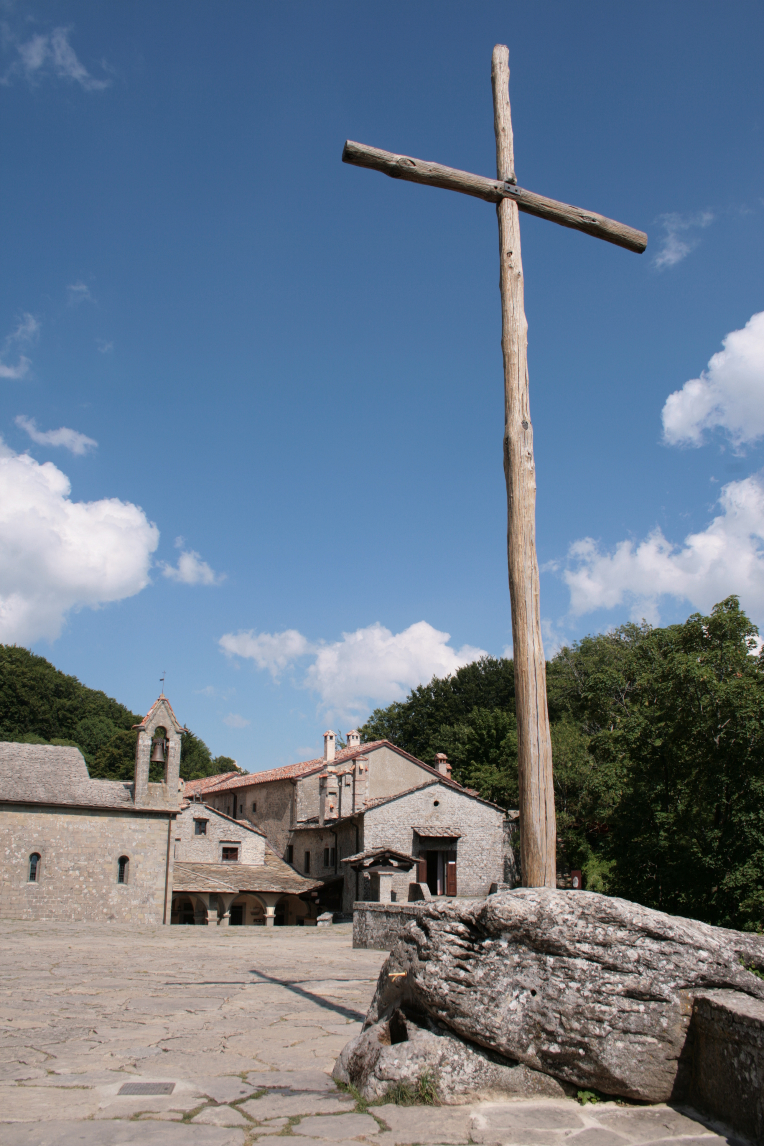 Croce del Santuario, La Verna